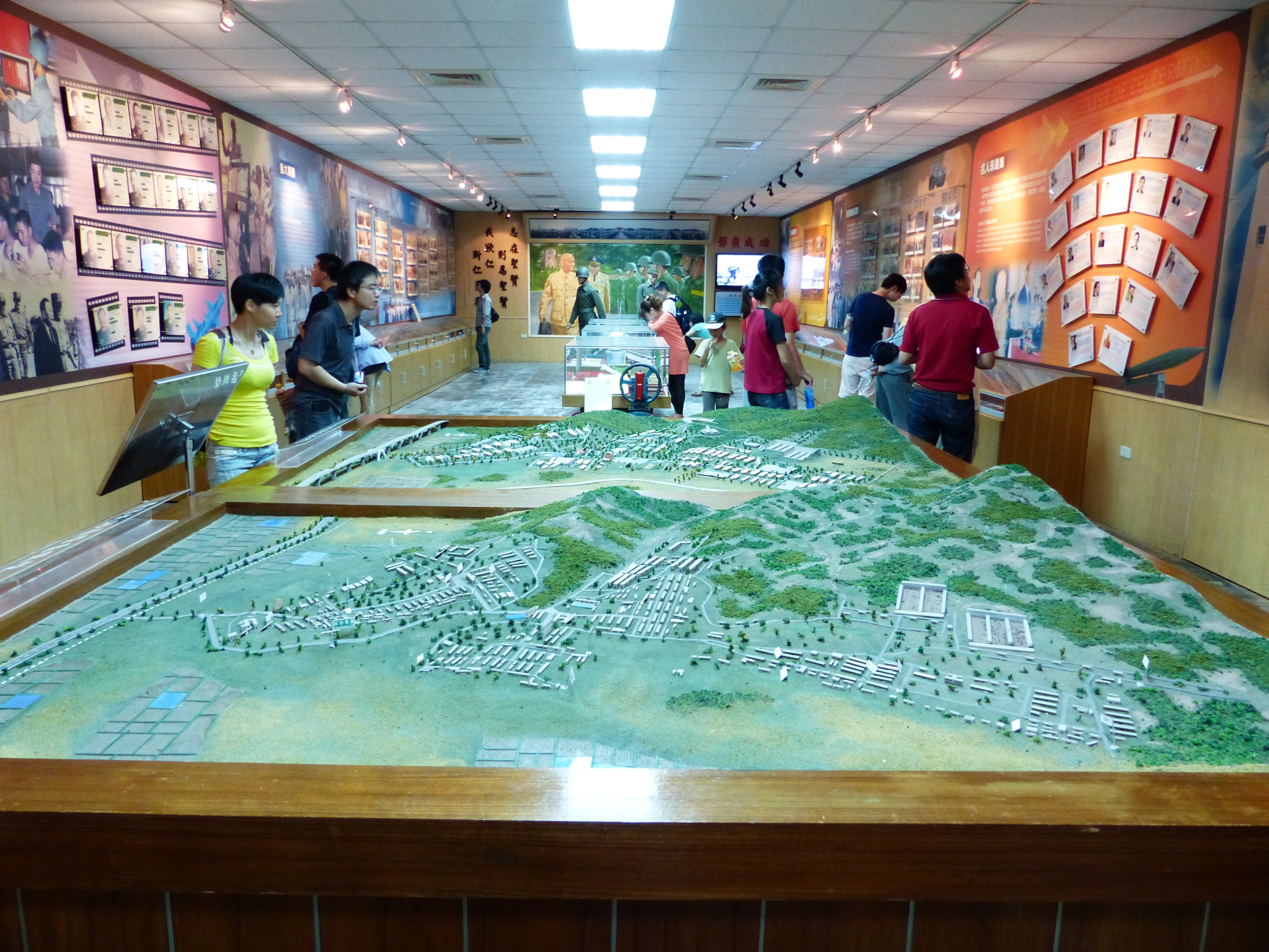 成功嶺隊史館展示的1960年代（前）與1990年代（後）成功嶺立體營區模型。